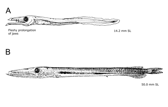 Anotopterus pharao, juvenile and adult.